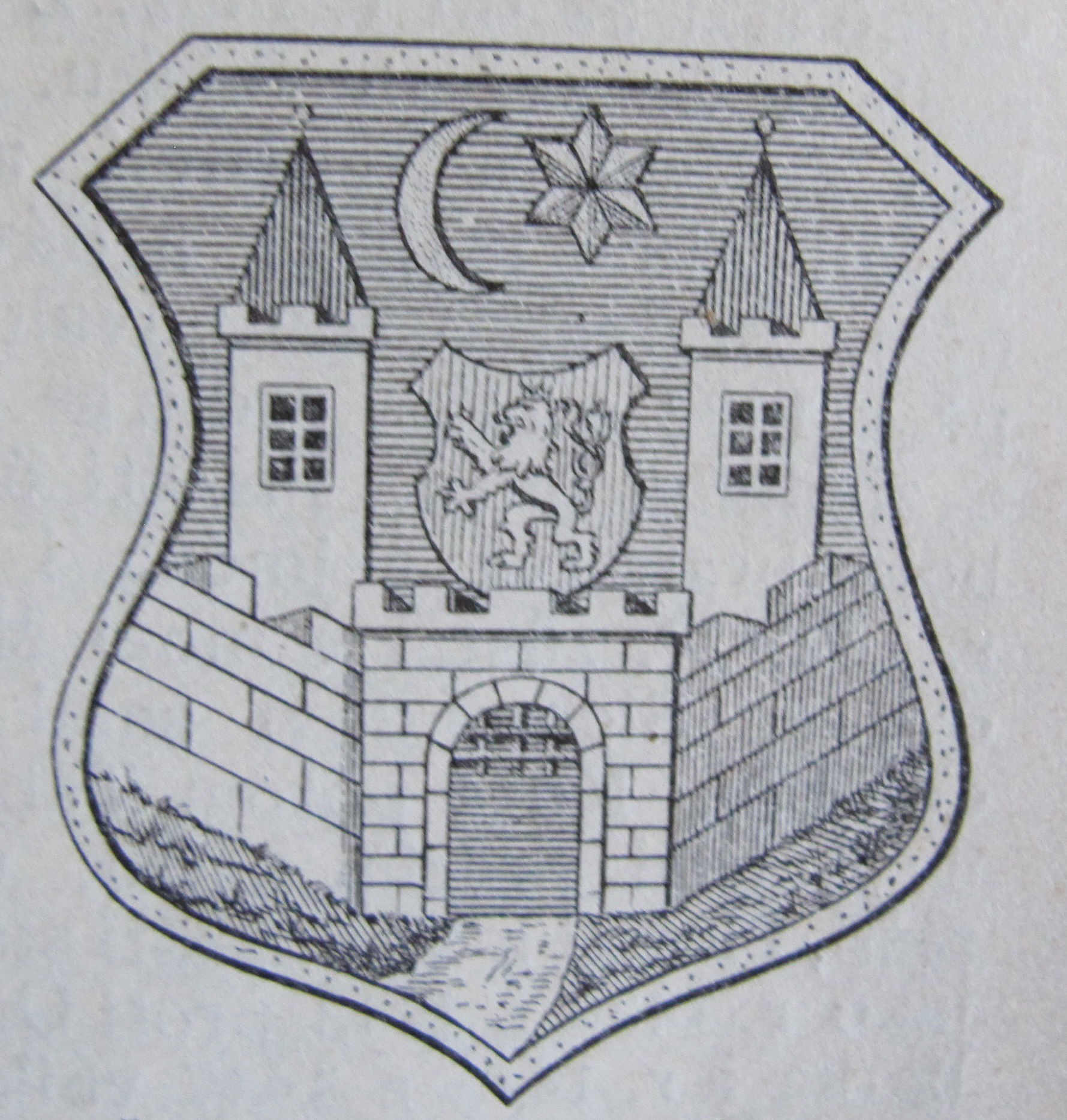 Původní popisek: Č. 3141. Znak města Písku.